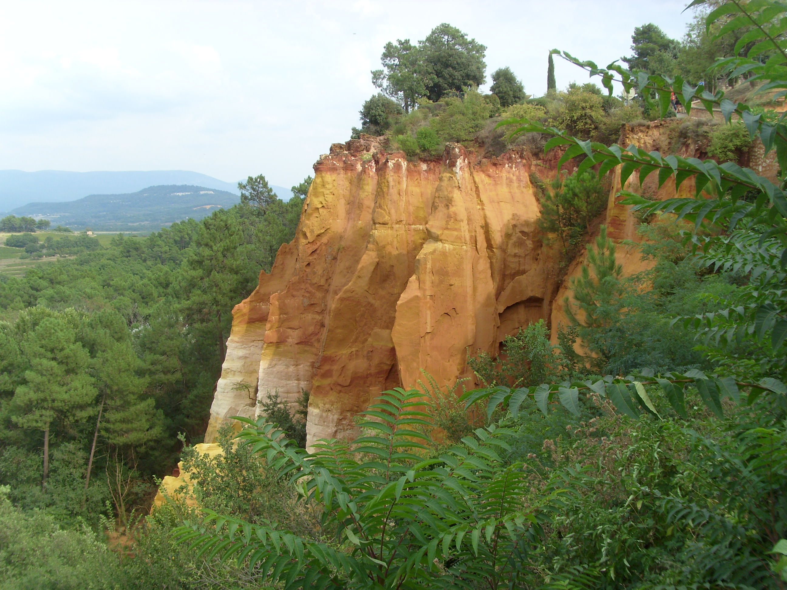 Sentier des ocres à Roussillon.